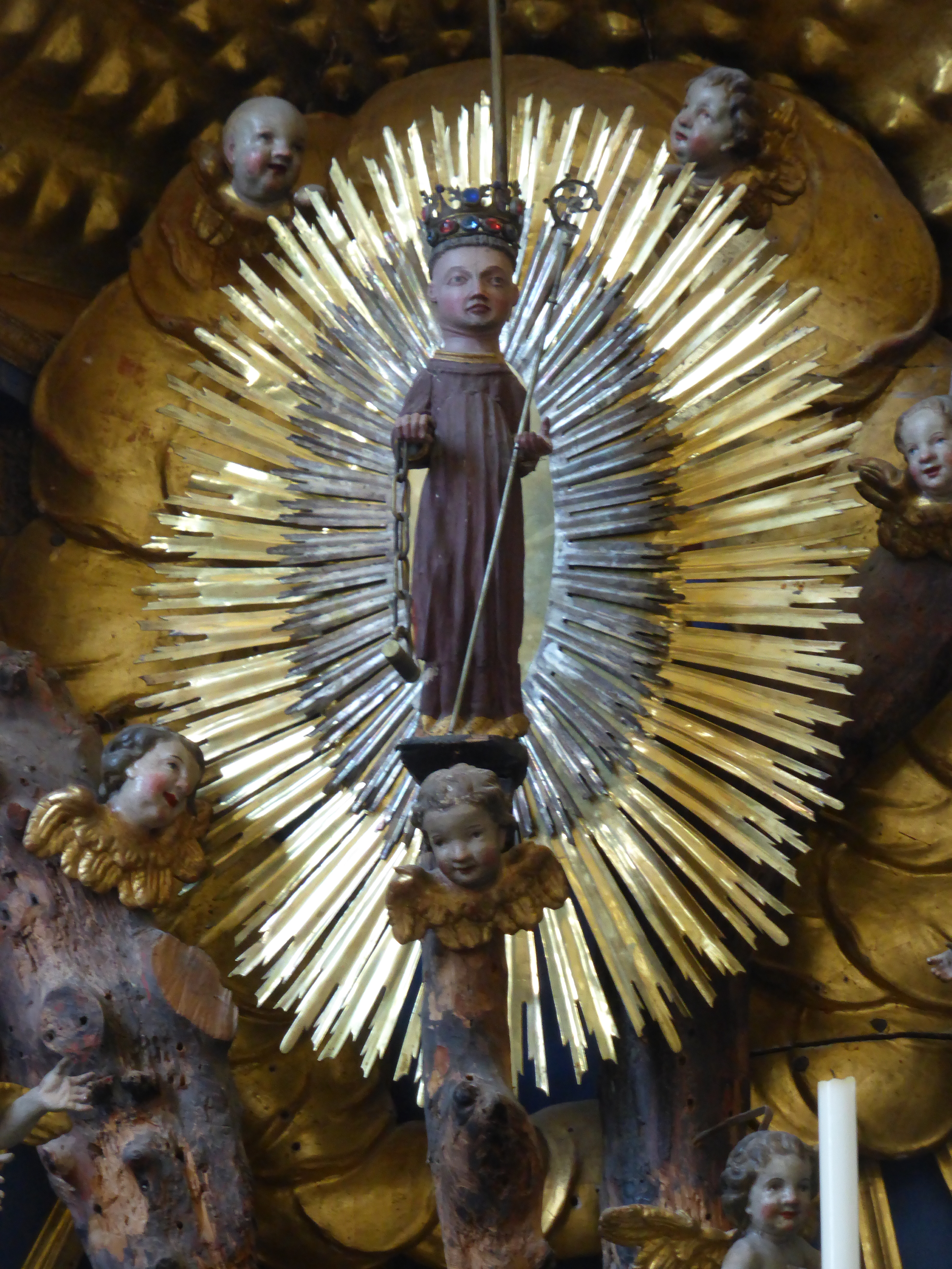 St. Lonhard ob Tamsweg auf dem Wacholderstrauch